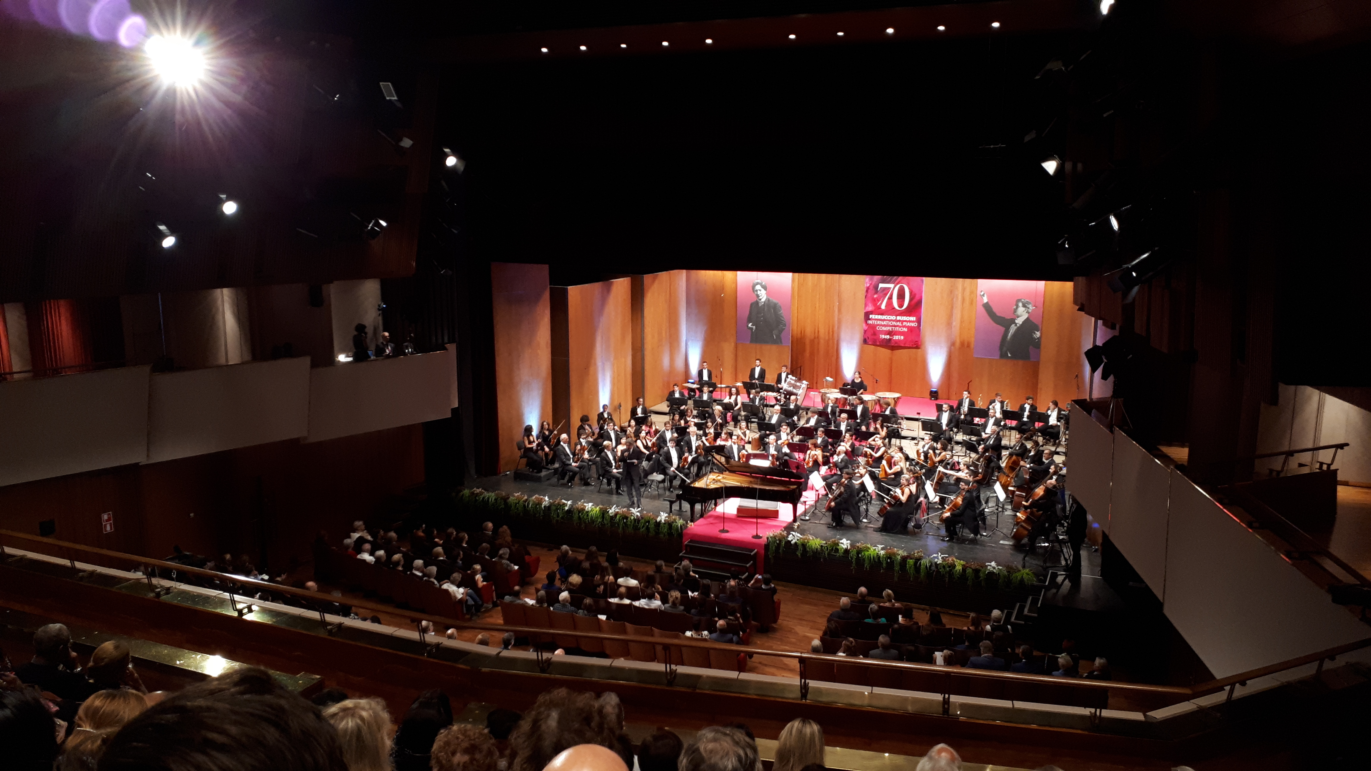 Finals of the Busoni Competition 2019 (Stadttheater Bozen).